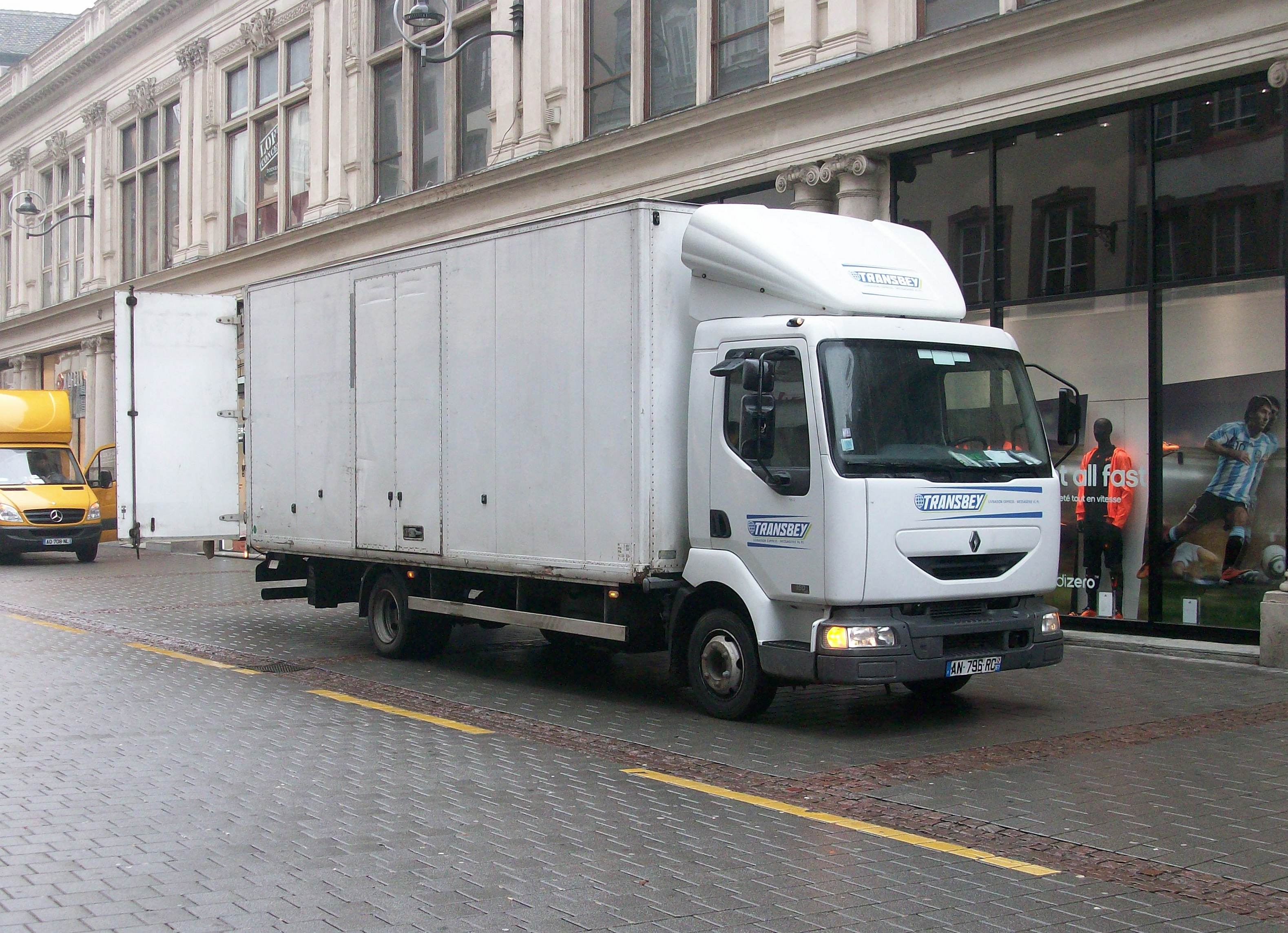 Renault Midlum en livraison dans la rue des grandes arcades à Strasbourg